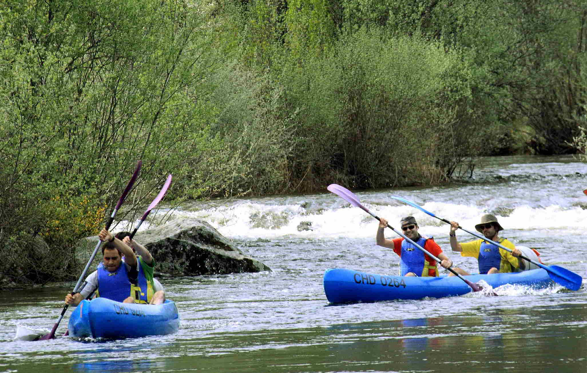 Tramo situado en la localidad de Ribadelago Viejo hacia el Lago de Sanabria.